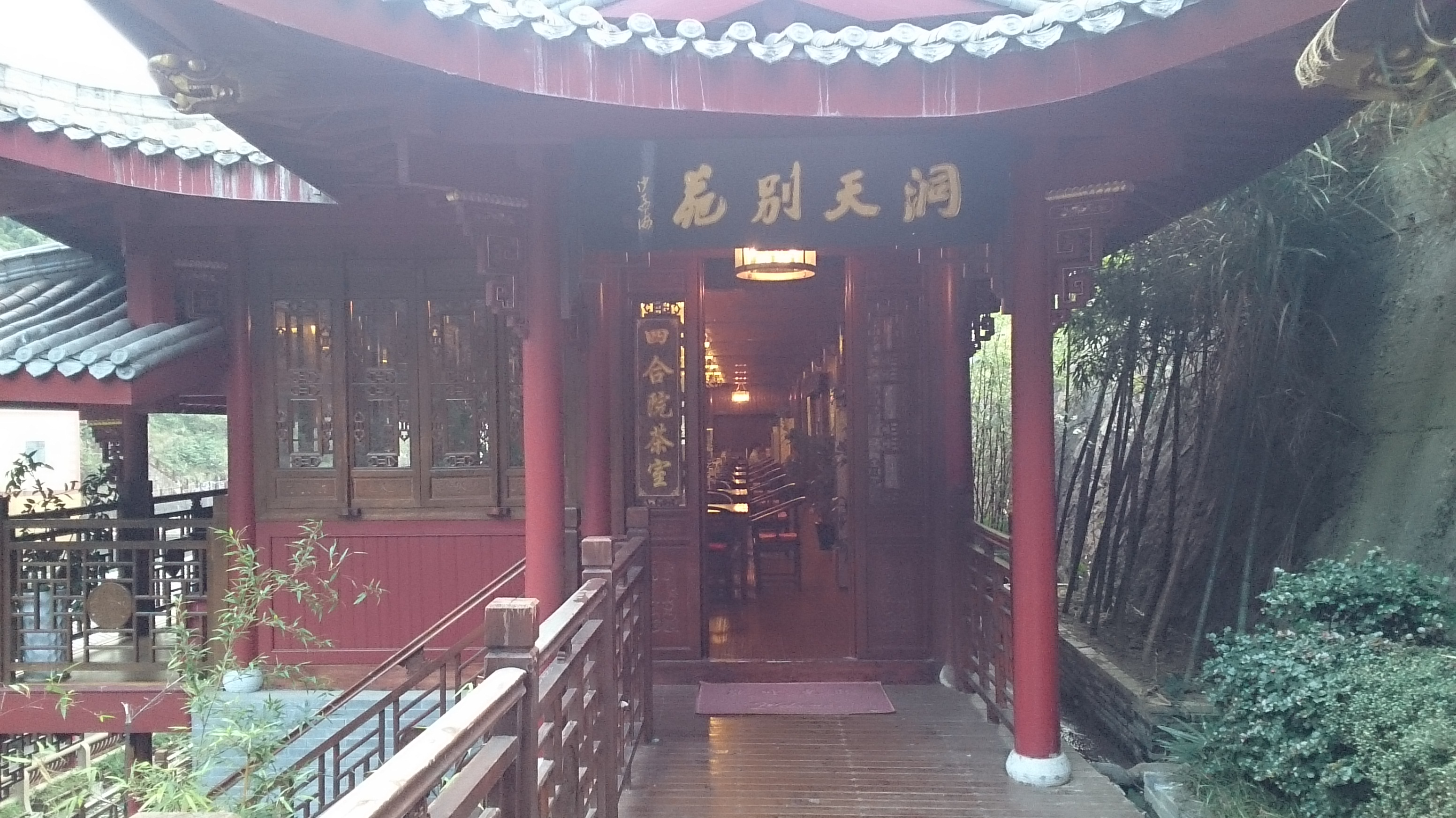 安吉縣天荒坪電站洞天茶館